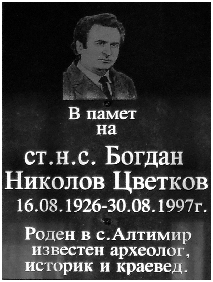 Паметна плоча на Богдан Николов, поставена на читалището в родното му село Алтимир на 29.10.2016 г.